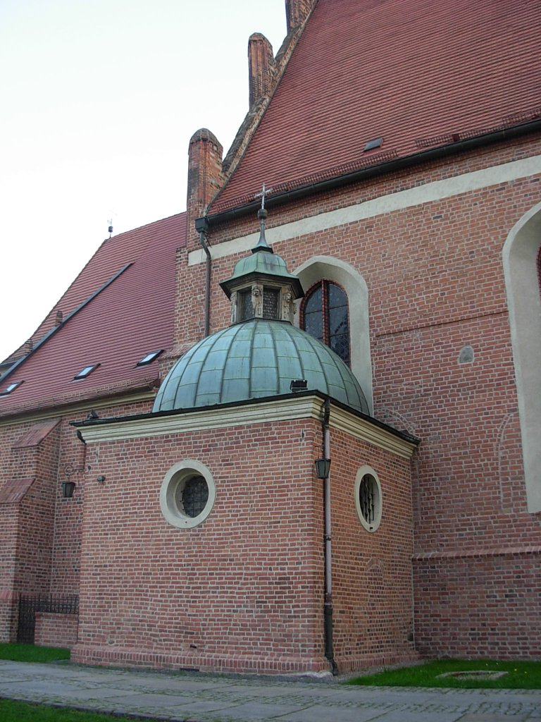 Katedra Bydgoska